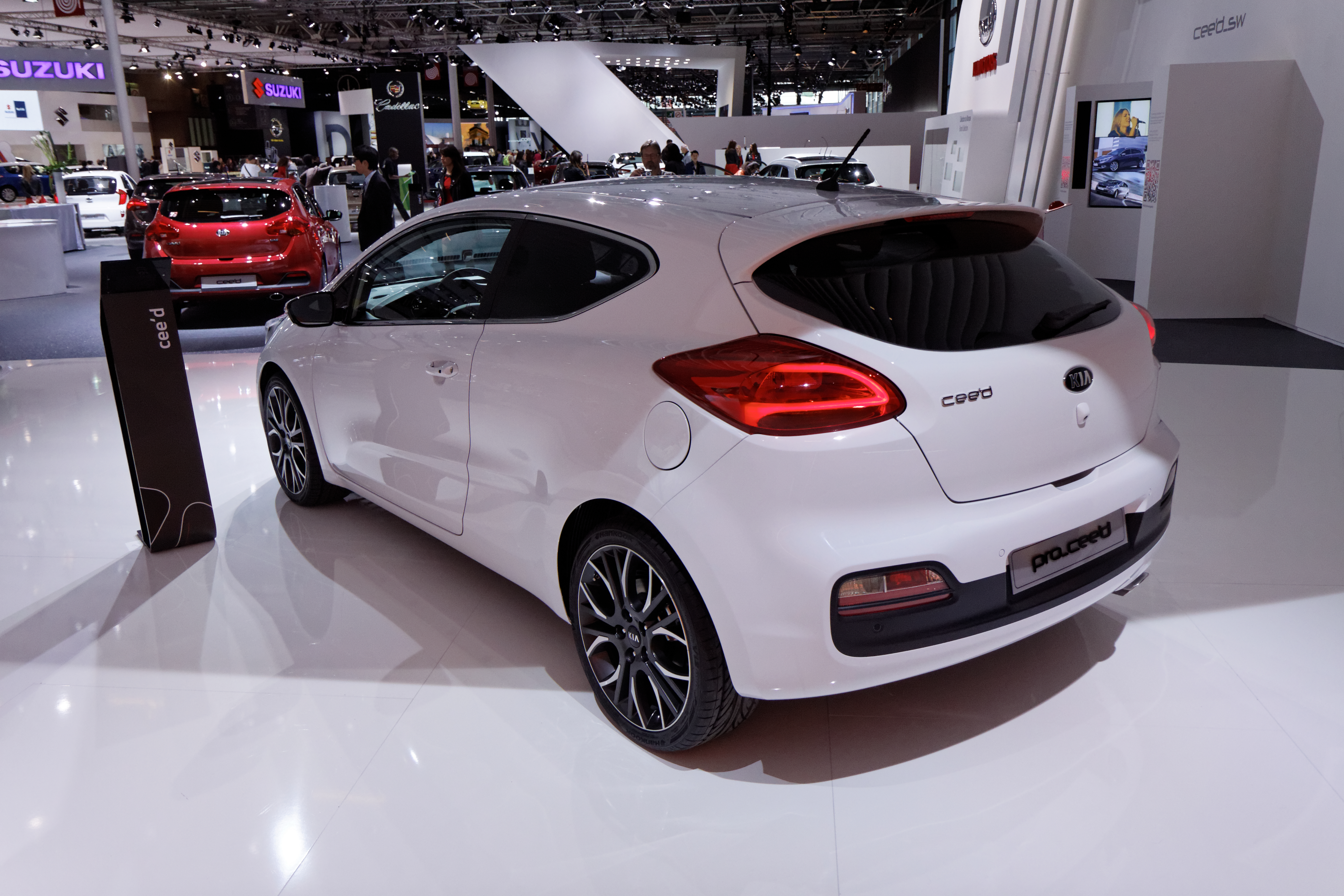 Une Kia Pro cee'd présentée lors du Mondial de l'Automobile de Paris 2012.